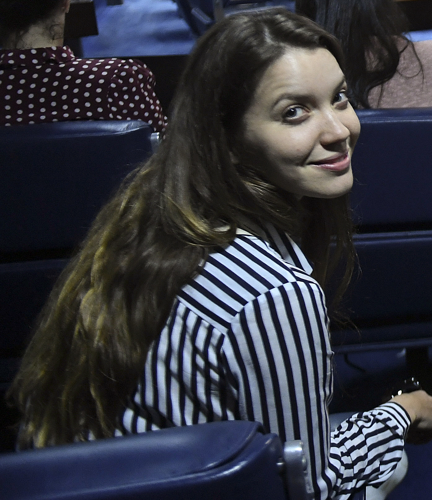 Plenário do Senado Federal durante sessão deliberativa ordinária. Ordem do dia. As atrizes Nathalia Dill, Paola Oliveira e Paula Burlamaqui acompanham sessão na tribuna de honra. As artistas vieram ao encontro do presidente do Senado para tratar sobre a votação do PLS 470/18 que aumenta a proteção aos animais.